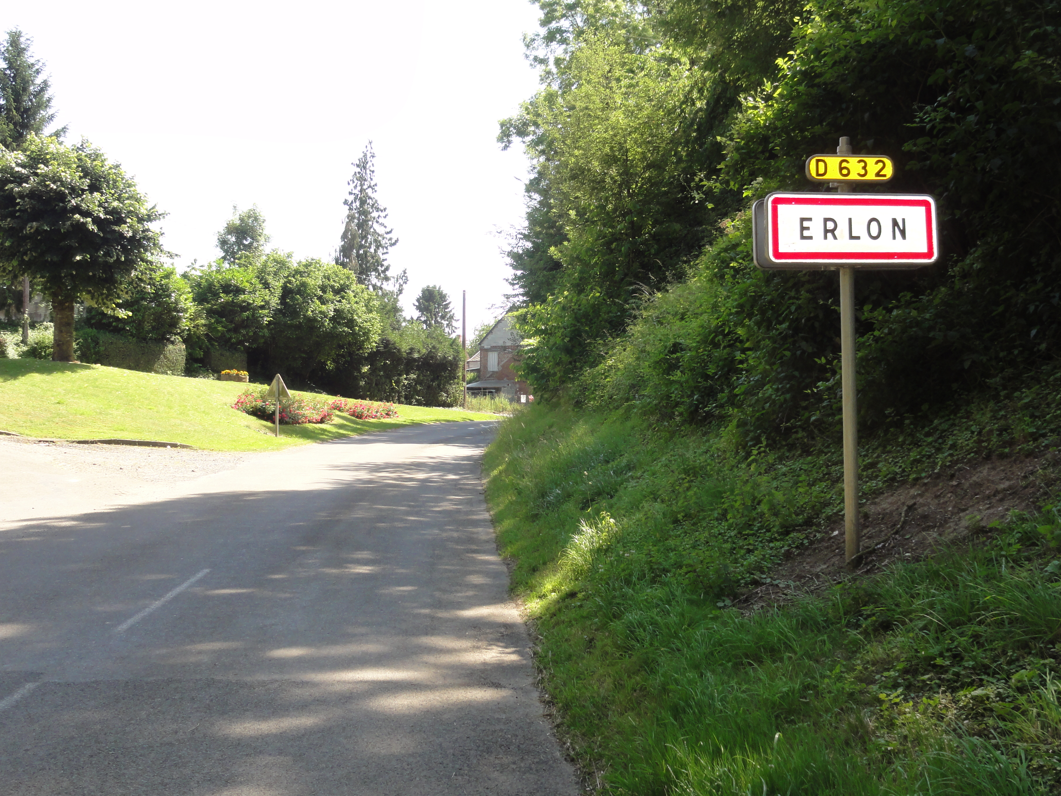 Erlon (Aisne) city limit sign